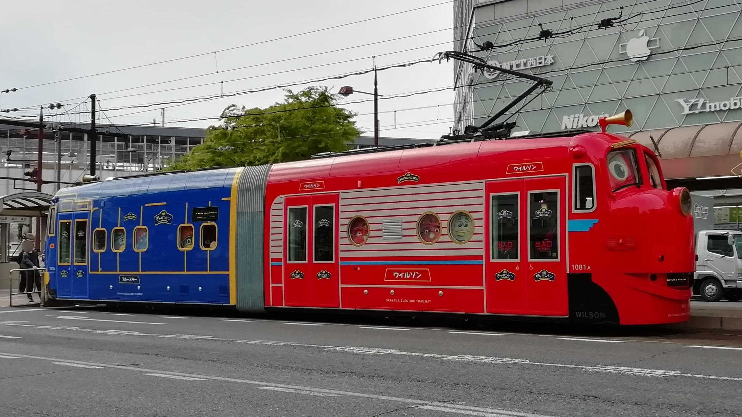 岡山駅前停留所に停車する「おかでんチャギントン列車」